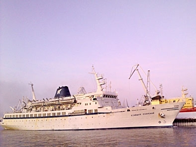 Vessel in Murmansk harbour